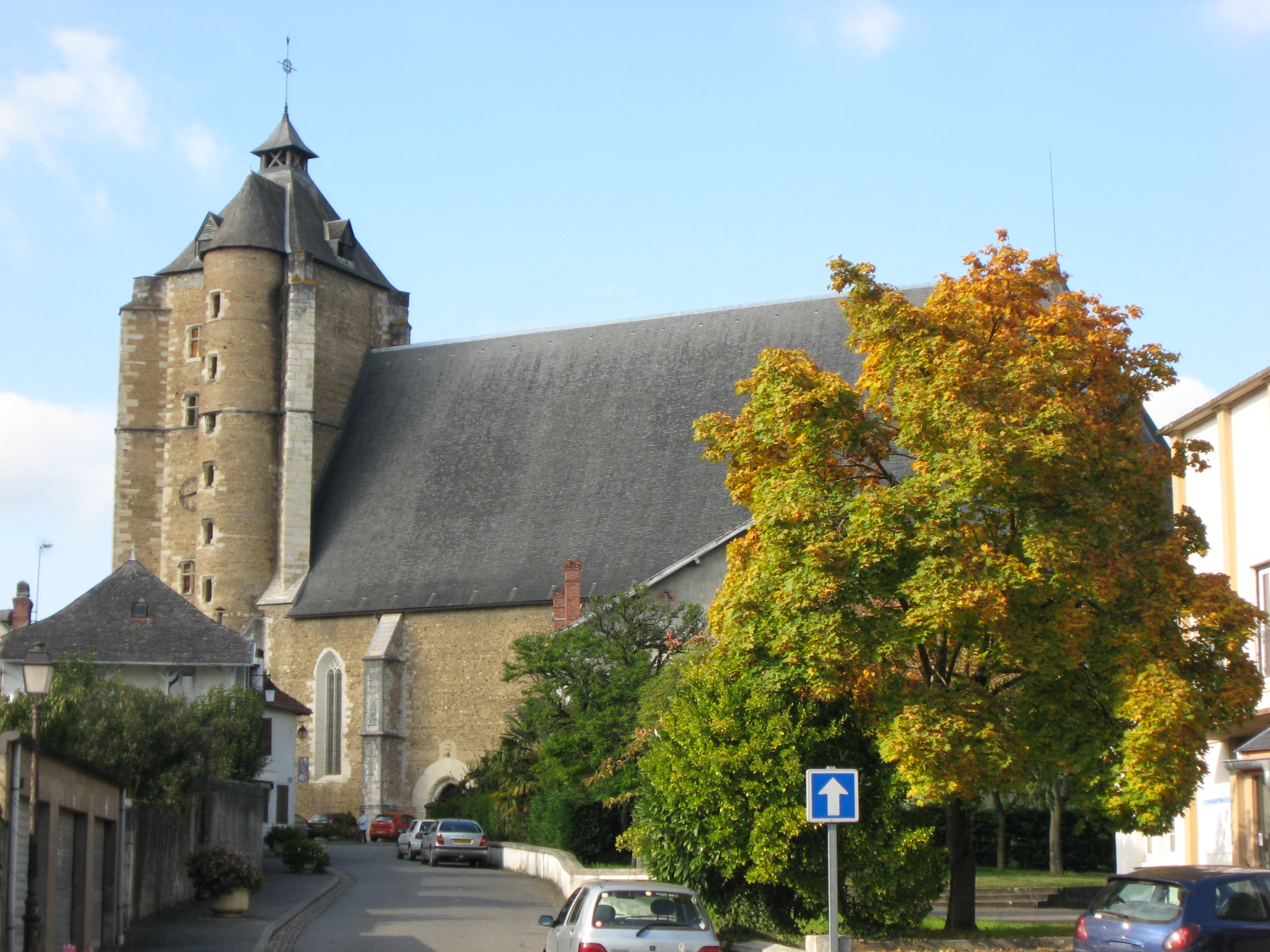 Eglise de Monein à la remarquable charpente (Pyrénées Atlantiques) Pyrénées).